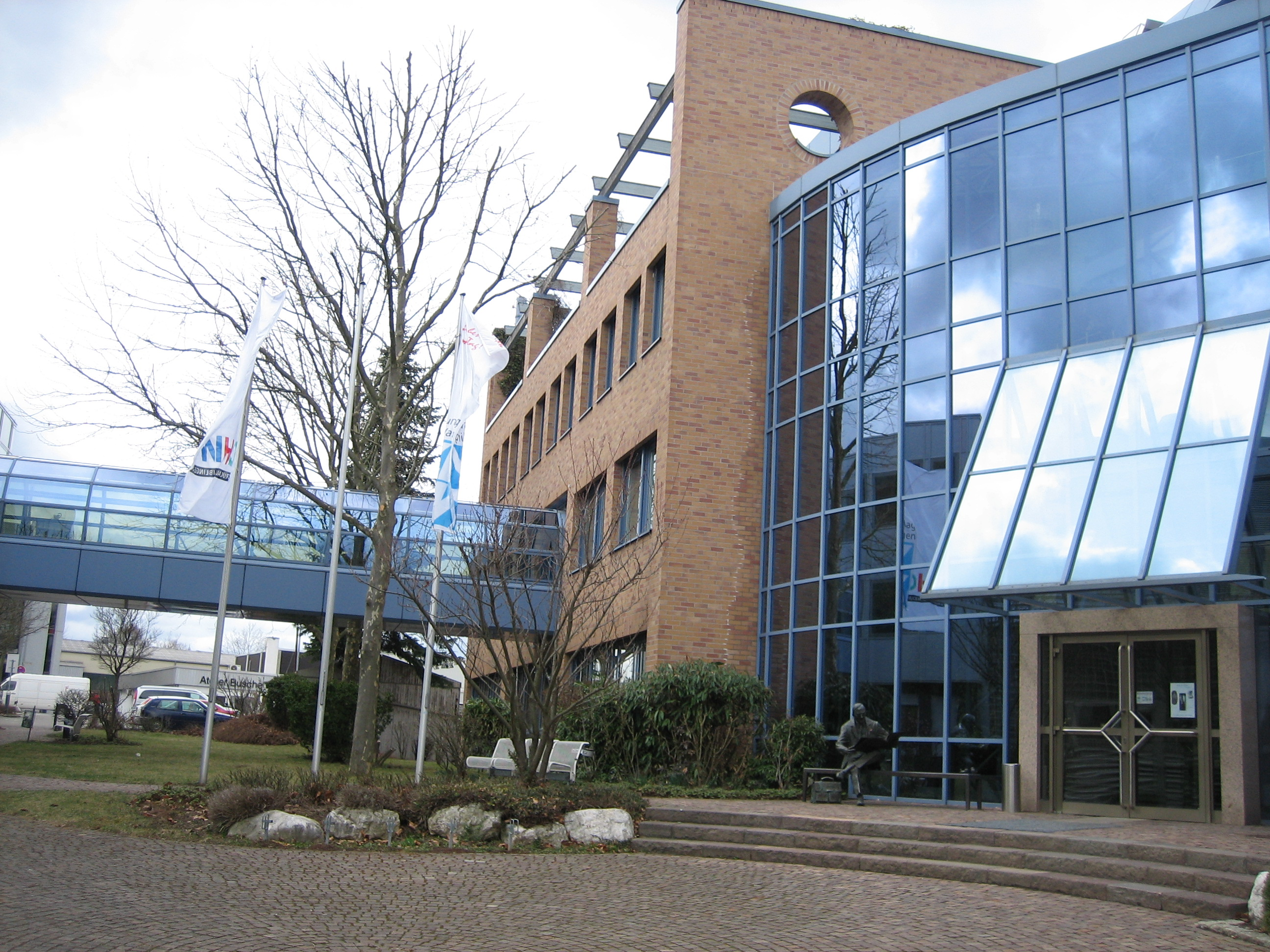 Bürogebäude des Zeitungsverlags Waiblingen